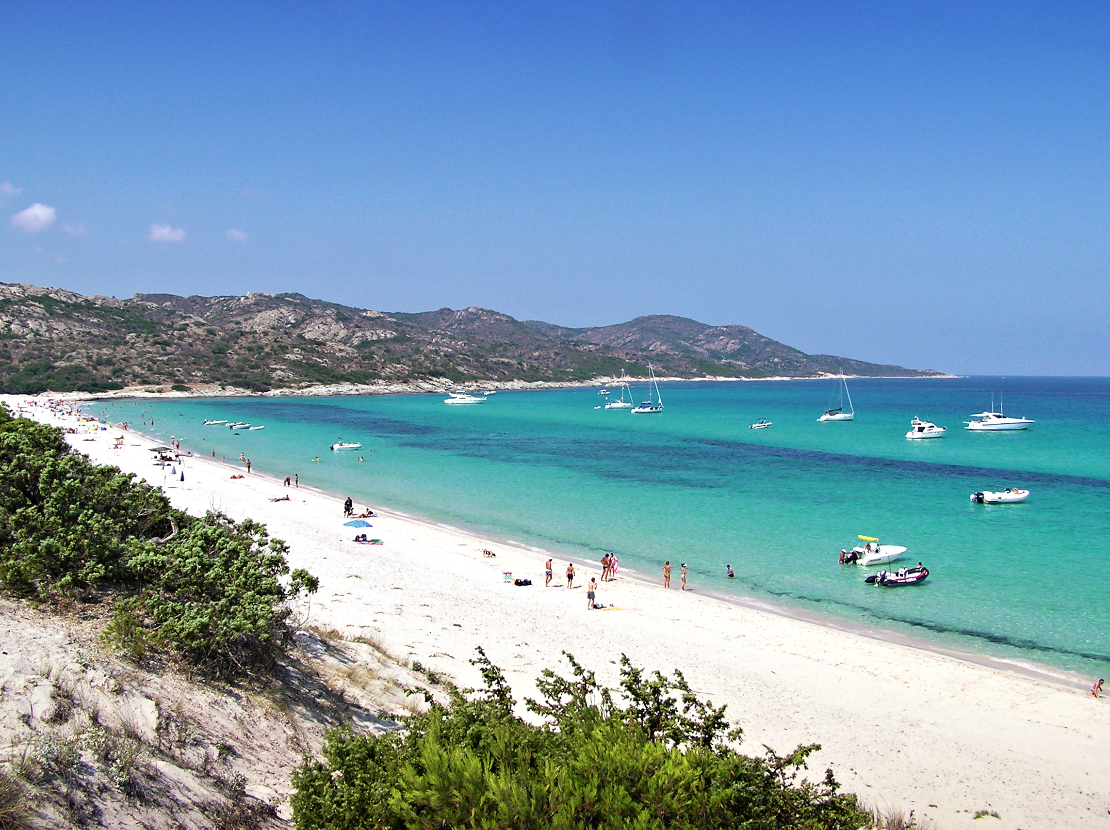 Santo-Pietro-di-Tenda (Corse) -¨Plage de Saleccia